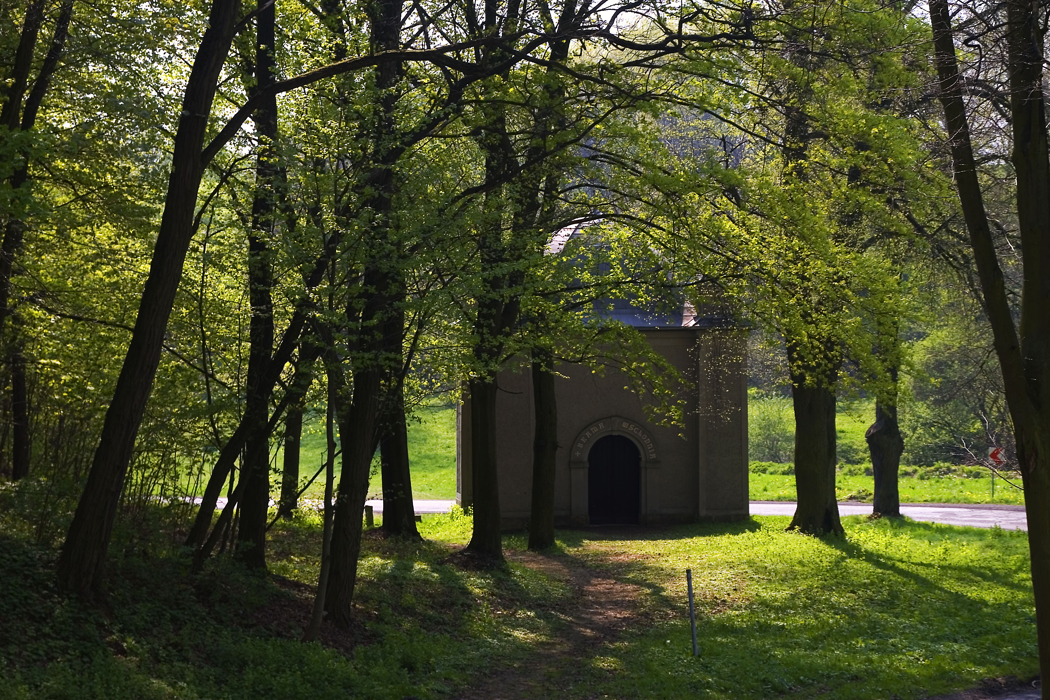 Góra św. Anny, kaplica Brama Wschodnia, Gmina Leśnica, powiat strzelecki